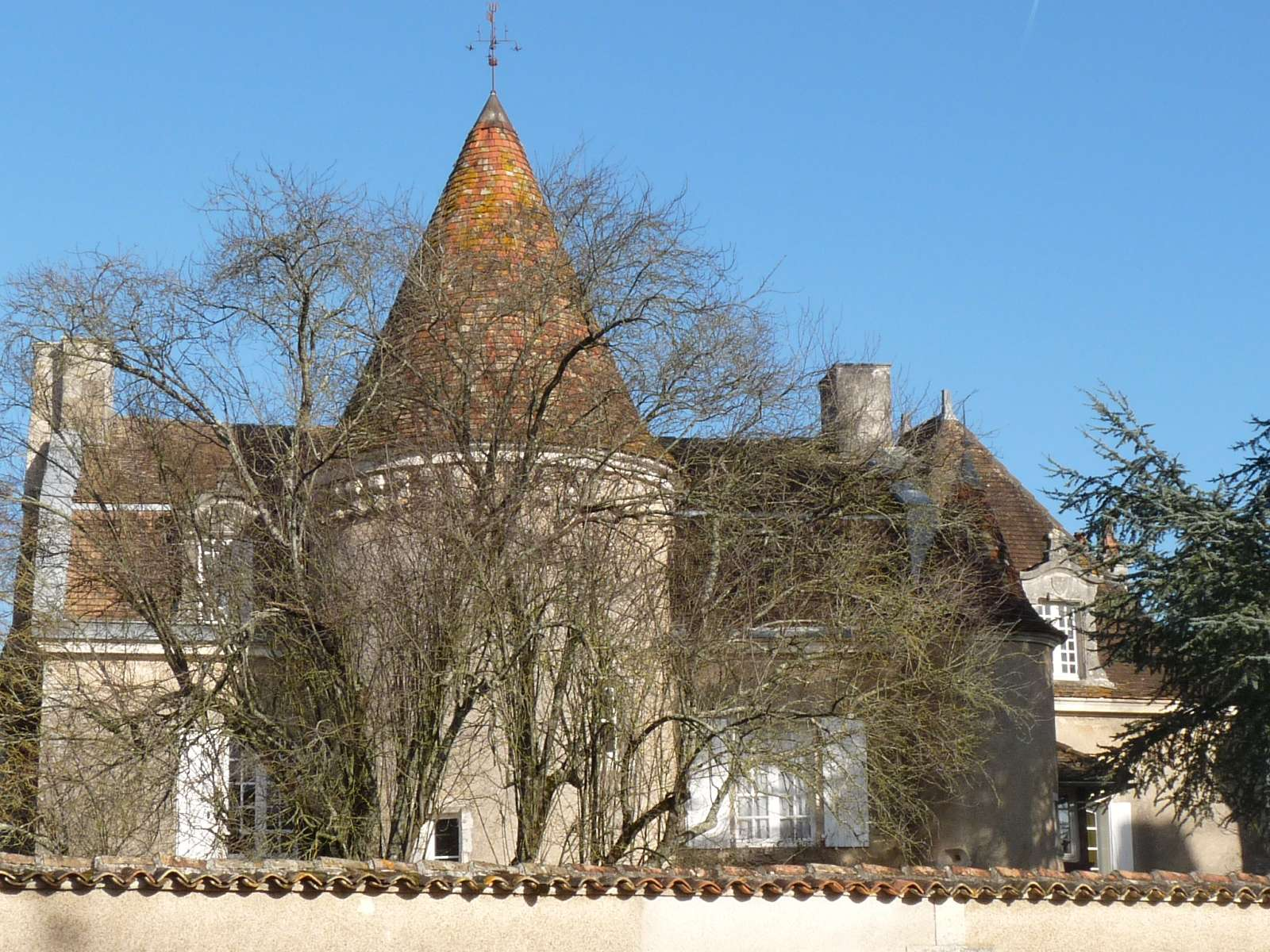 château à Feuillade, Charente, France